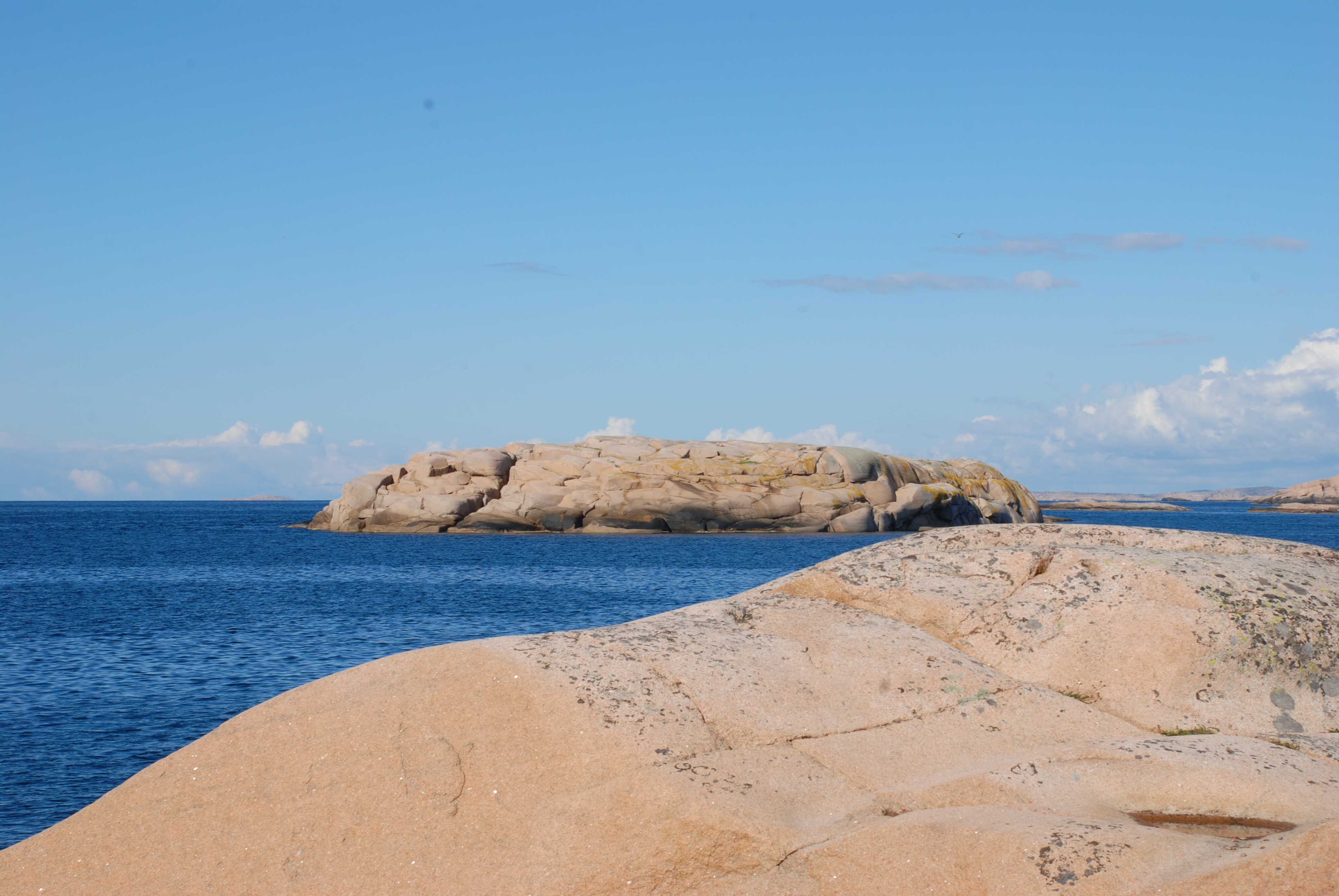 Naturreservatet Ramsvikslandet utanför Hunnebostrand i Bohuslän. Klippor och utsikt norr om Sote Bonde.